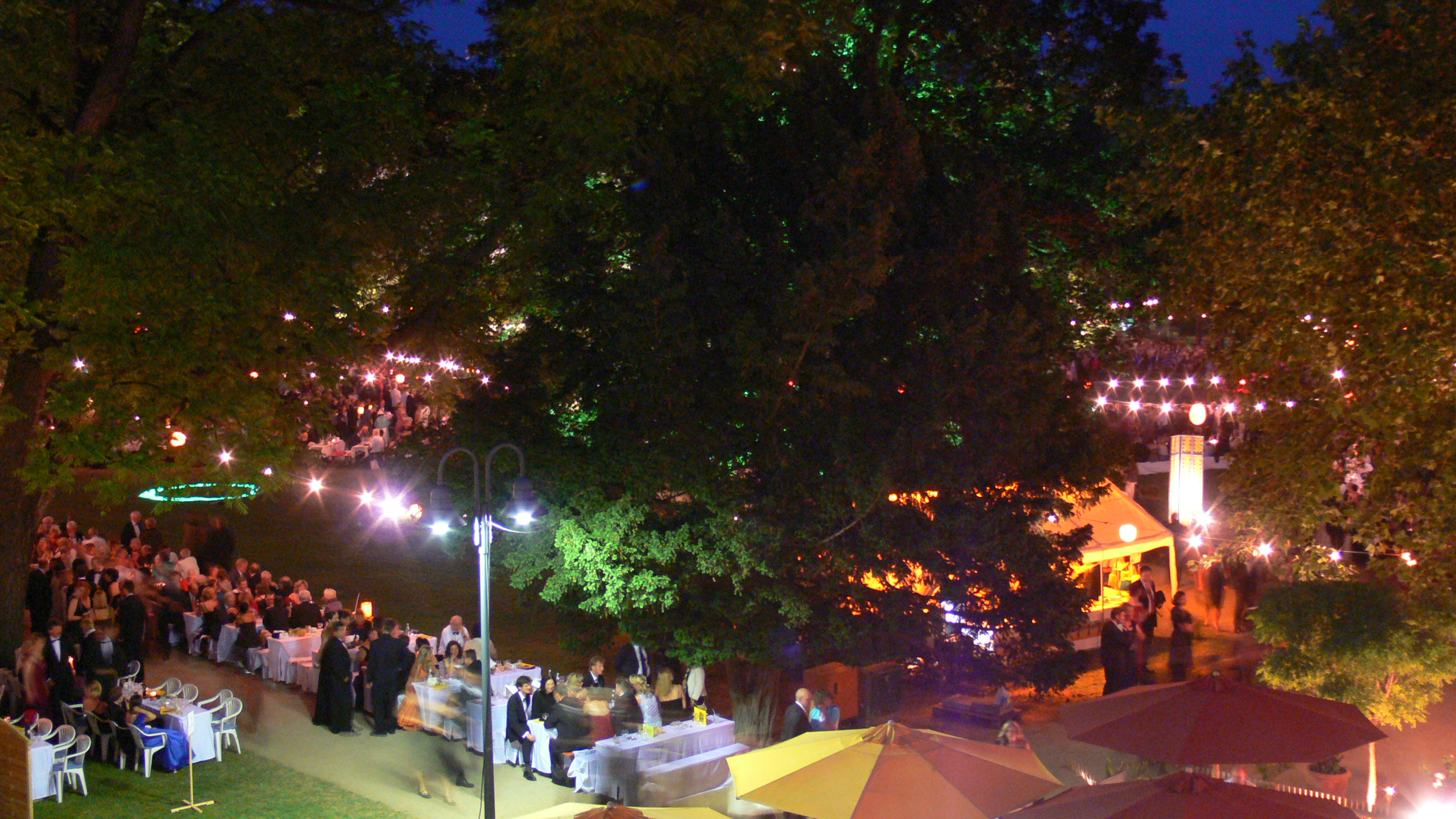 Blick auf das Erlanger Schlossgartenfest